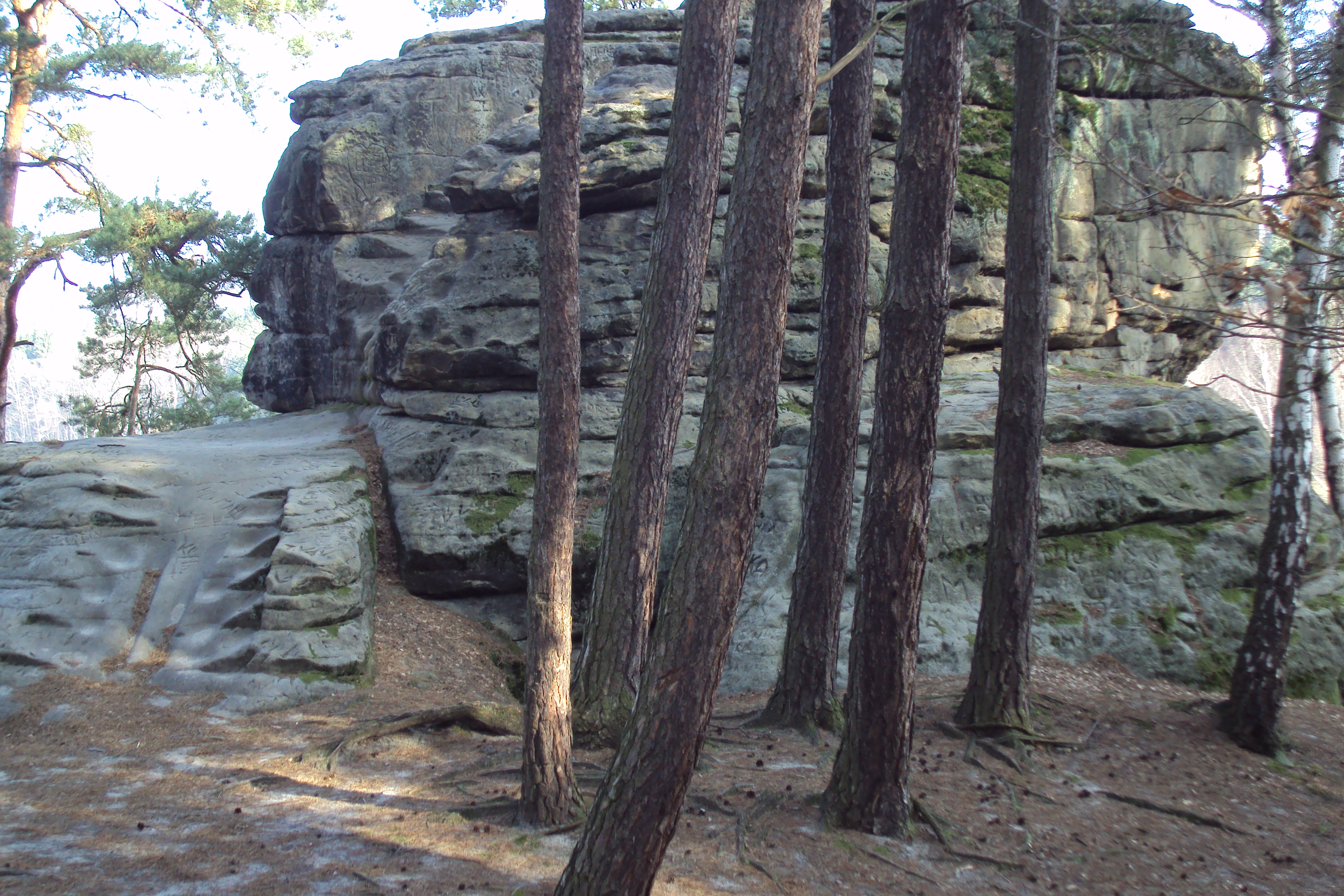 Skála Smrtka nad Koňským rybníkem, katastr obce Stvolínky na Českolipsku, součást Holanských rybníků